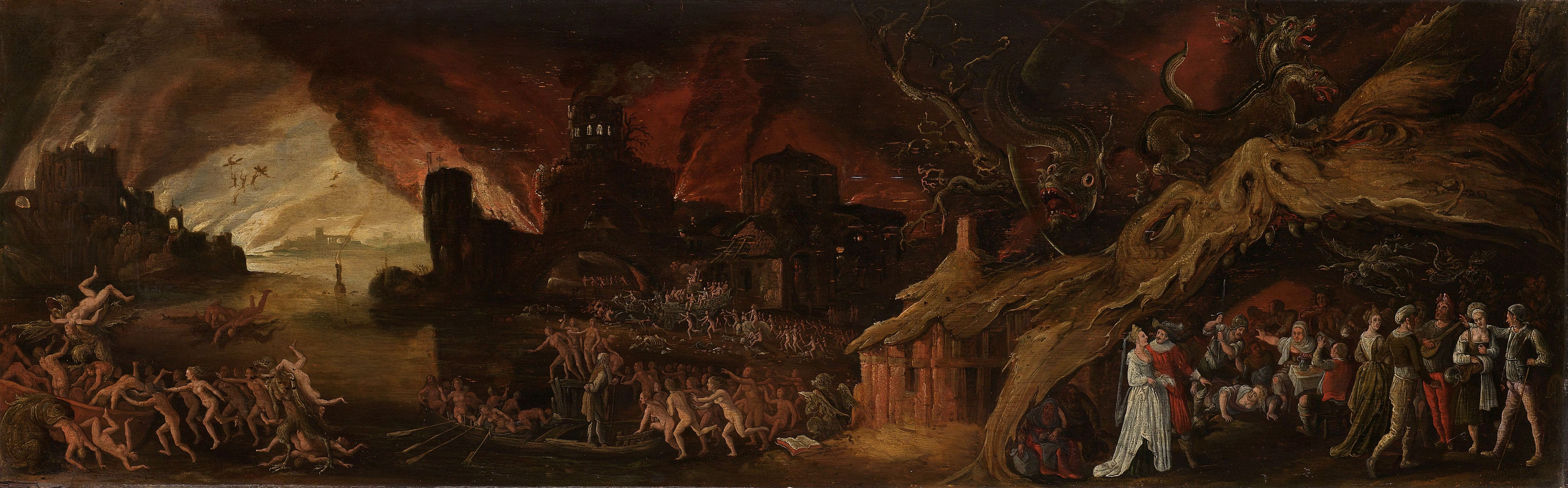 Het laatste oordeel en de zeven hoofdzonden. De hel waarin de naakte verdoemden in groepen uitzwermen over het land en water, rechts een grote hellemond waarin de hoofdzonden door figuren worden verbeeld. Overal vliegen duivels en monsters, links enkele grote gebouwen en vlammen